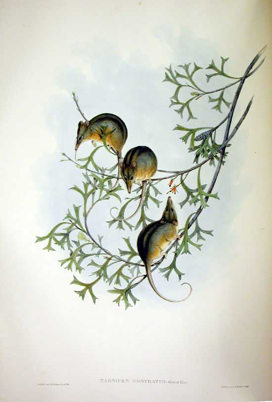 Tarsipes rostratus